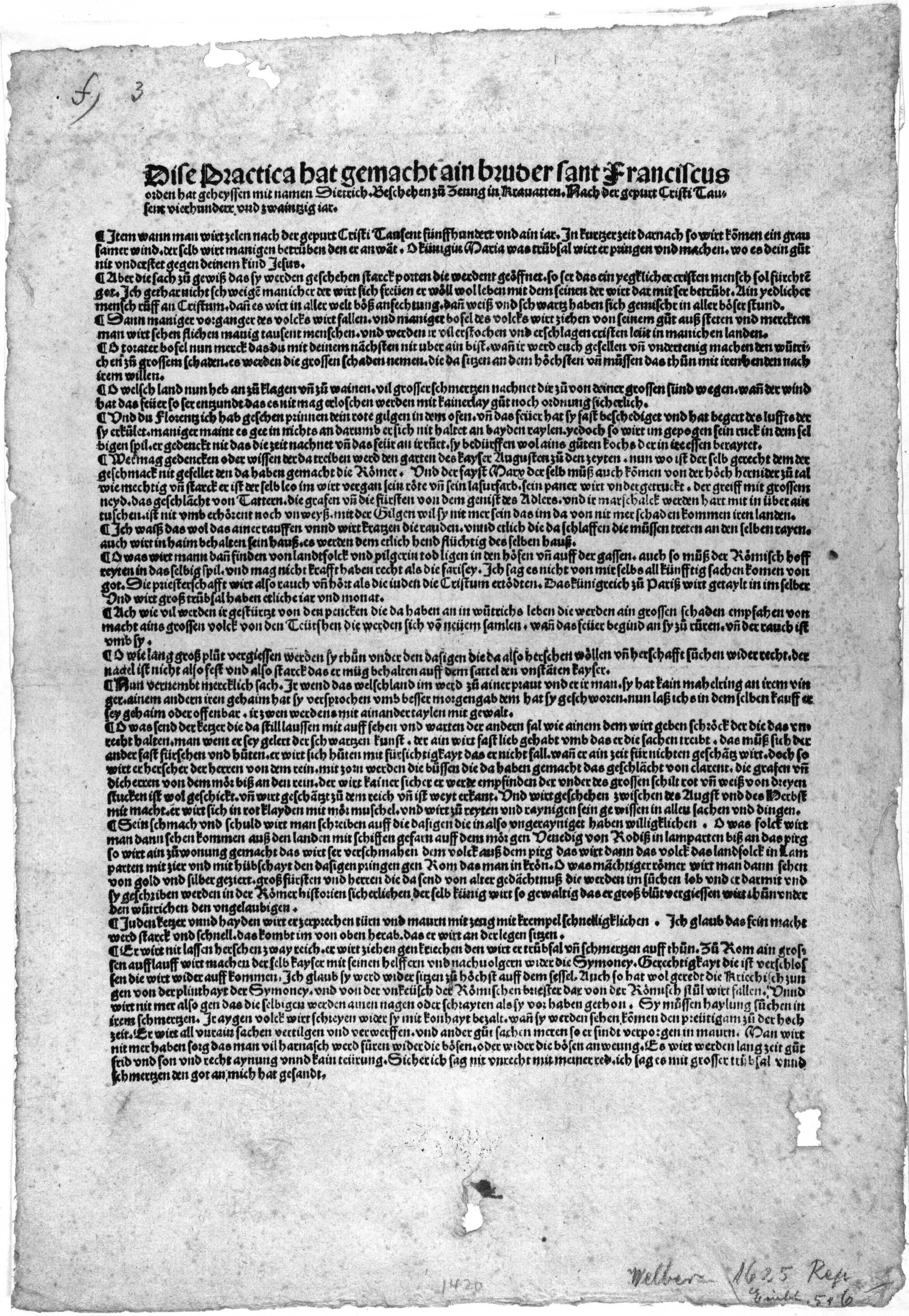 Theodoricus : Practica. [Augsburg: Johann Froschauer, nicht vor 1503]